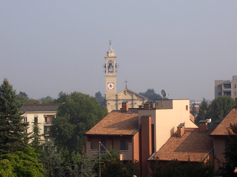 Arcore - Chiesa Parrocchiale di S. Eustorgio vista da Villa Ravizza